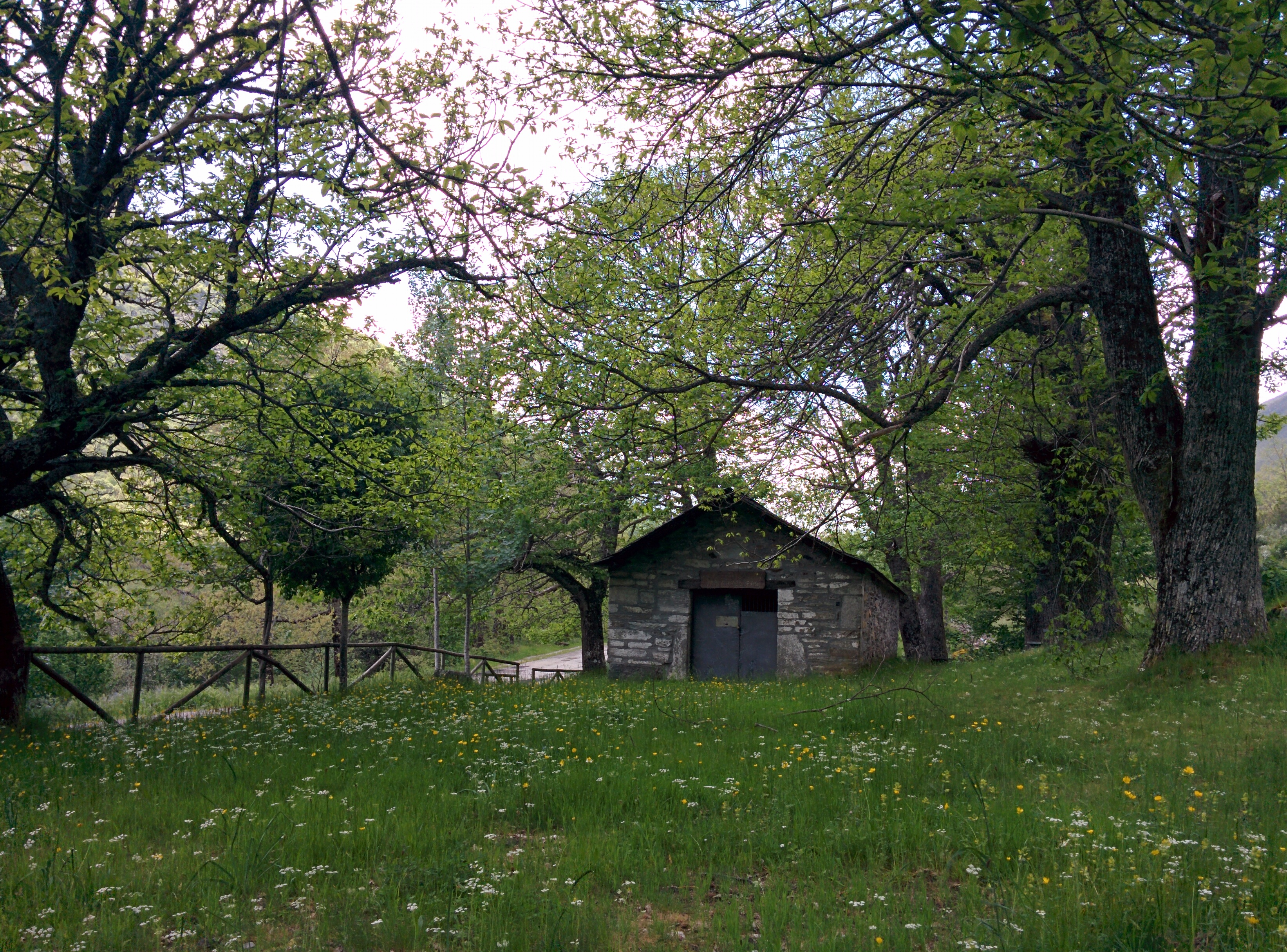 Ermita de la Magdalena, en Tejedo de Ancares (León, España).